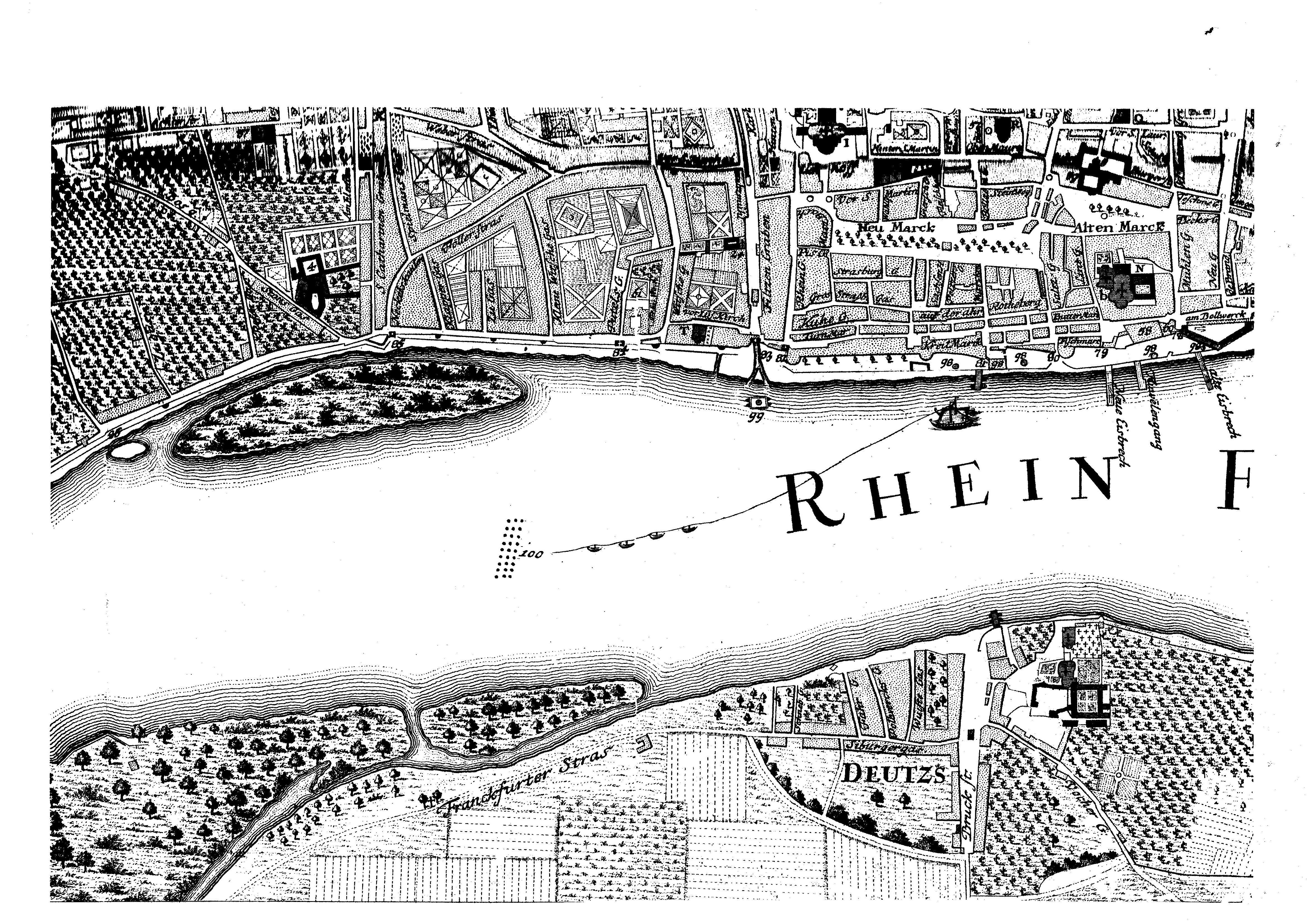 Plan der Stadt Köln von 1752. Ausschnitt des Bereichs des heutigen Deutzer Hafens und des Rheinauhafens.